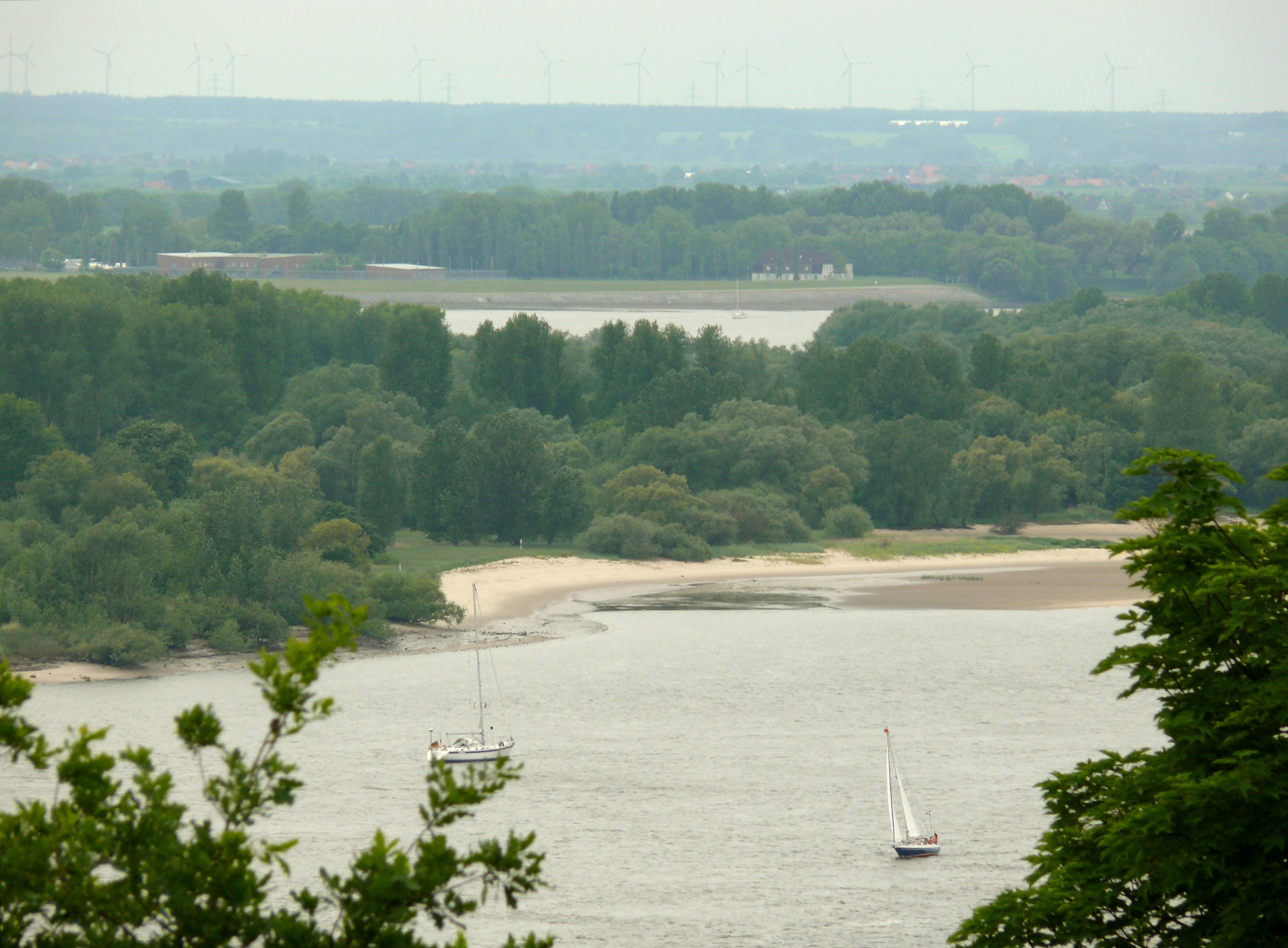 NSG Mühlenberger Loch/Neßsand